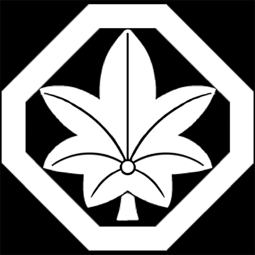 「隅切り角に一葉紅葉」紋（染抜）